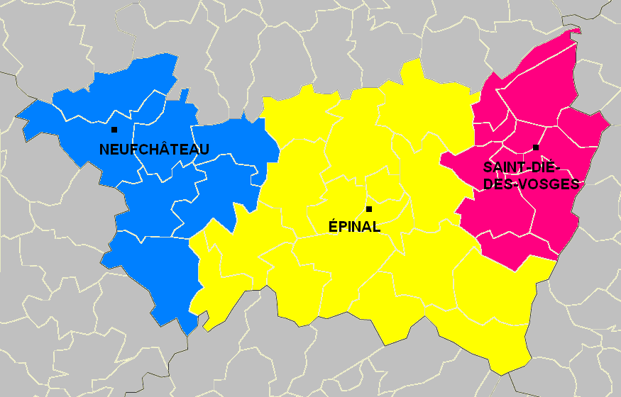 Arrondissements du département des Vosges